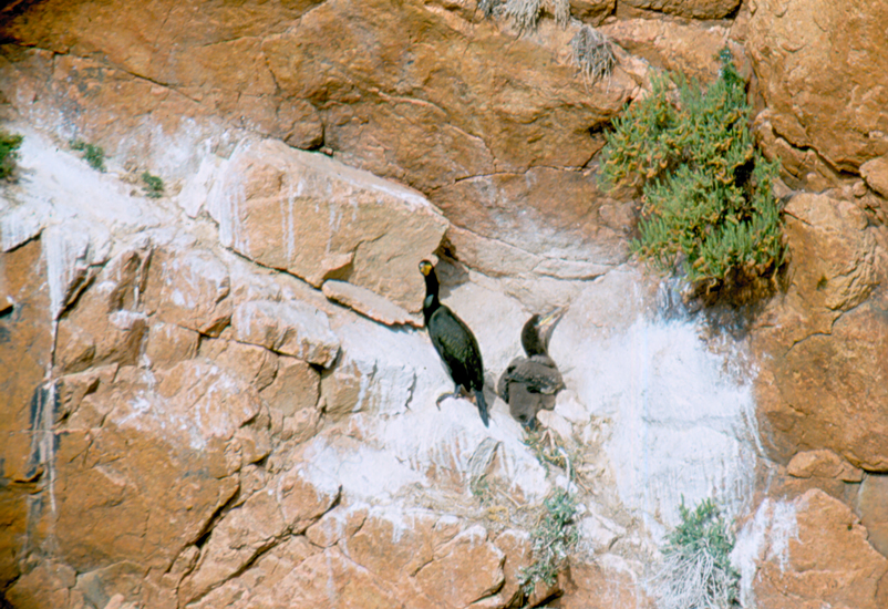 Reproduction du Cormoran huppé Phlalacrocorax aristotelis sur une falaise des îles Berlengas (Portugal, mai 1981). A gauche : un adulte, à droite : un immature.